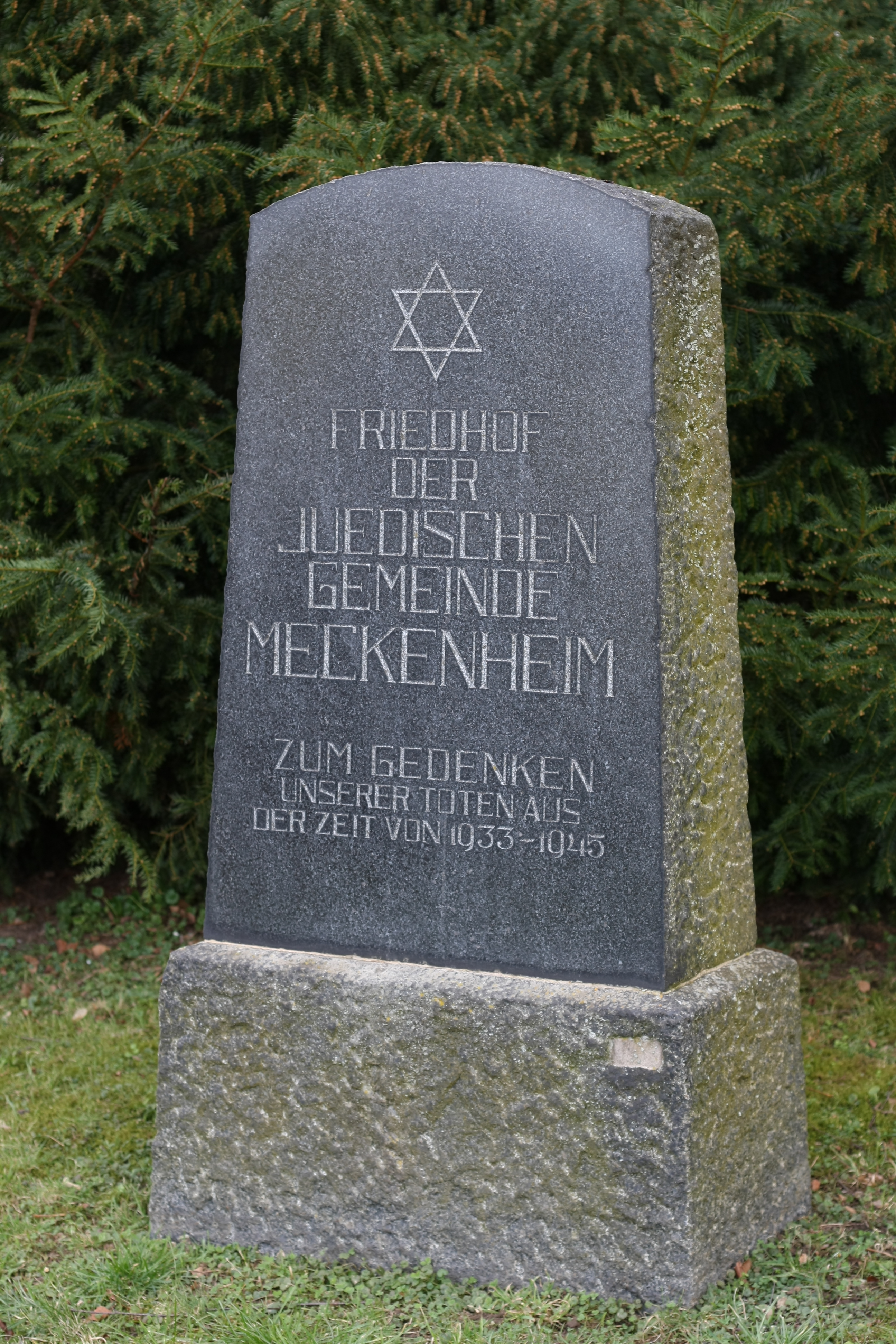 Jüdischer Friedhof in Meckenheim, Gedenkstein mit folgender Inschrift: Frieden der jüdischen Gemeinde. Zum Gedenken unserer Toten aus der Zeit von 1933-1945